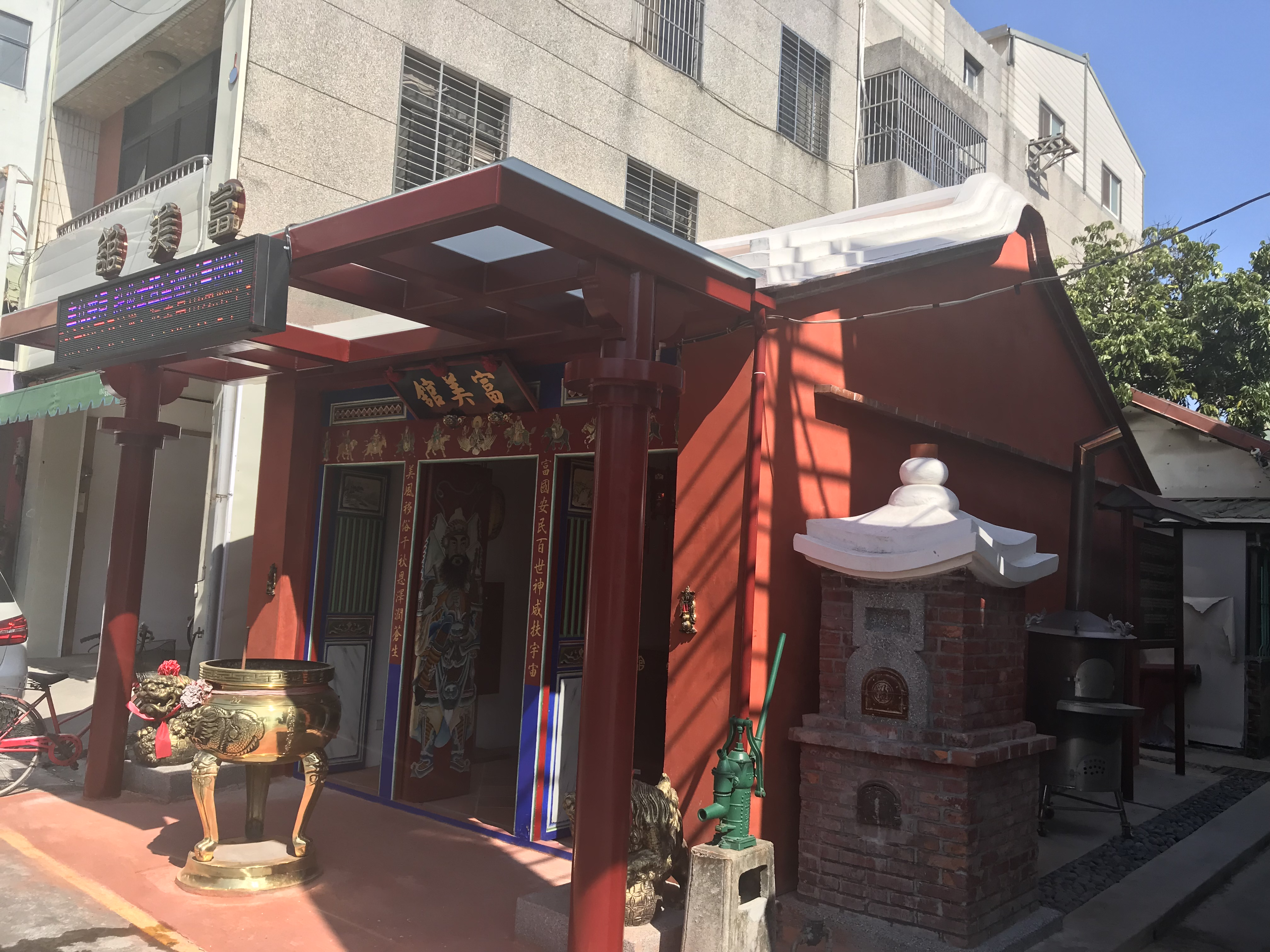 北斗富美館斜照